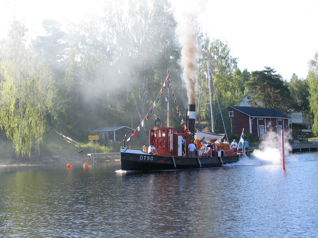 Höyrylaiva "Otso" Oravin kanavassa